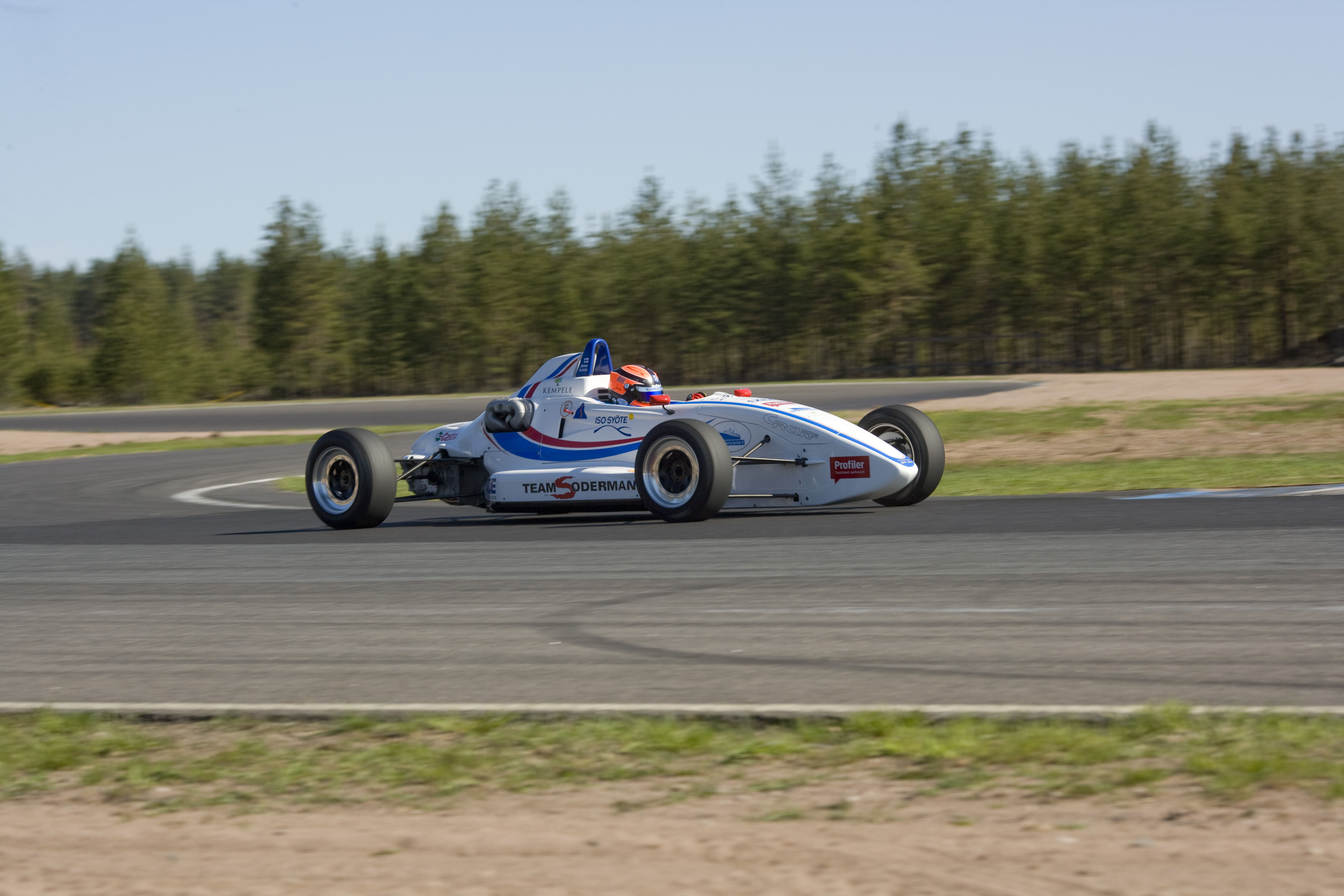 Jesse Anttila driving Formula Ford